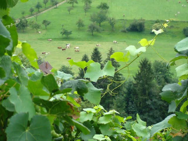 Im Glottertal bei Freiburg: Blick aus einem Weinberg (am Eichberg) auf die gegenüberliegende Talseite mit weidenden Kühen.